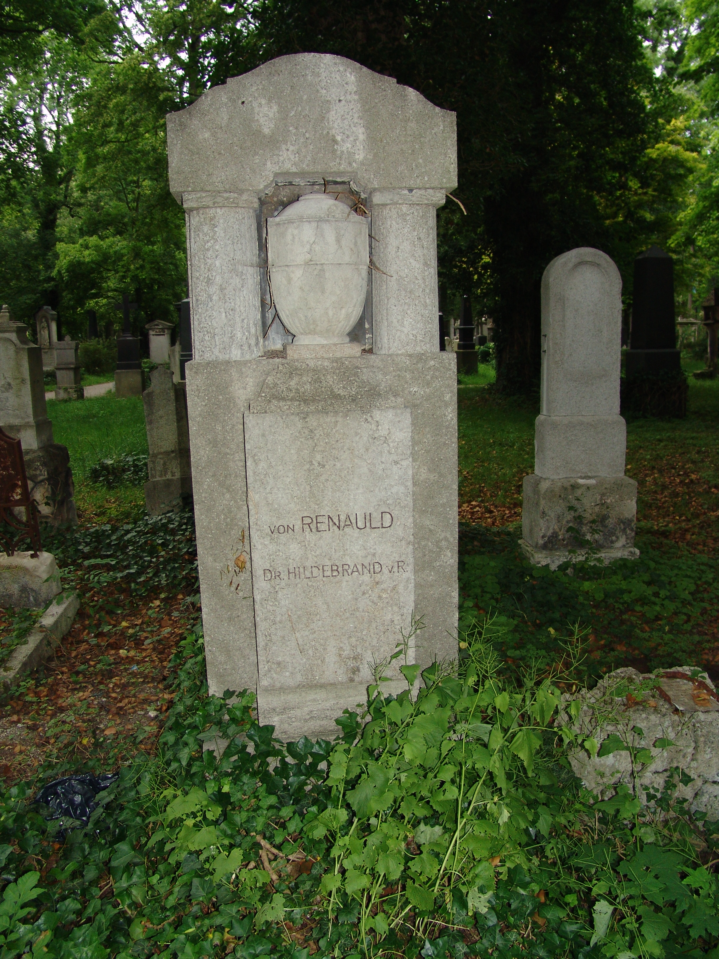 München Alter Südfriedhof: Grabmal des Priv. Doz. Dr. rer. pol. Josef Reichsritter von Renauld Edler zu Kellenbach und seiner Tochter Dr. Maximiliane Hildebrand von Renauld